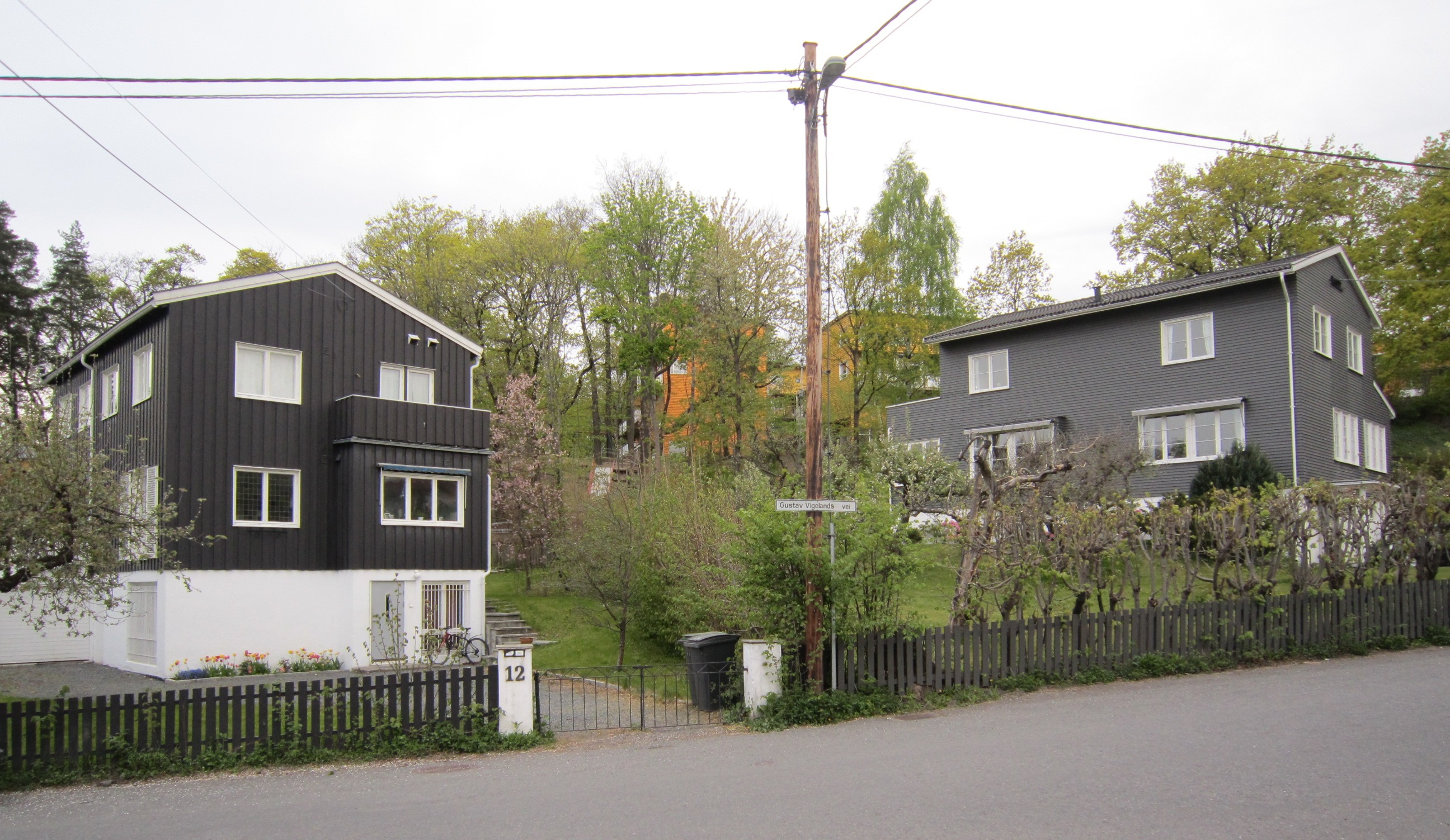 Typiske villaer på vestsiden av Gustav Vigelands vei